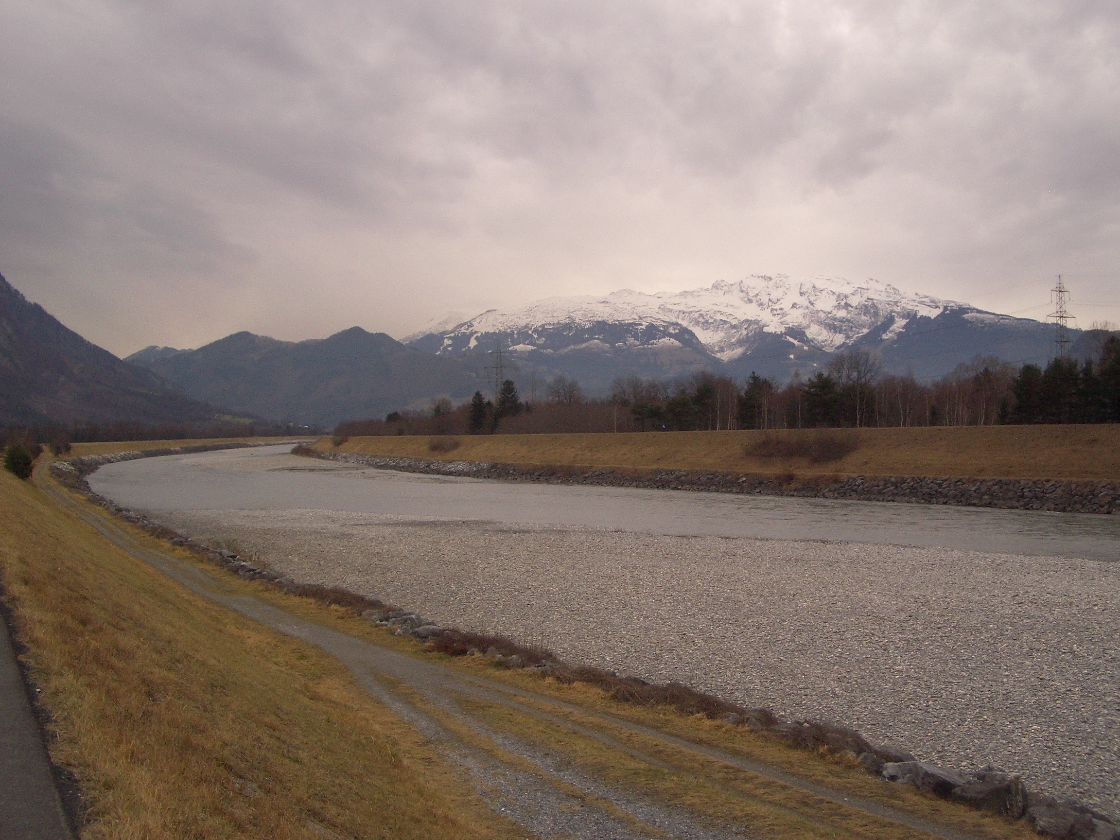 Rhein bei Triesen in Liechtenstein (links) an der Grenze zur Schweiz (rechts); Freileitung Rüthi–Bonaduz in Wartau (CH, rechts)